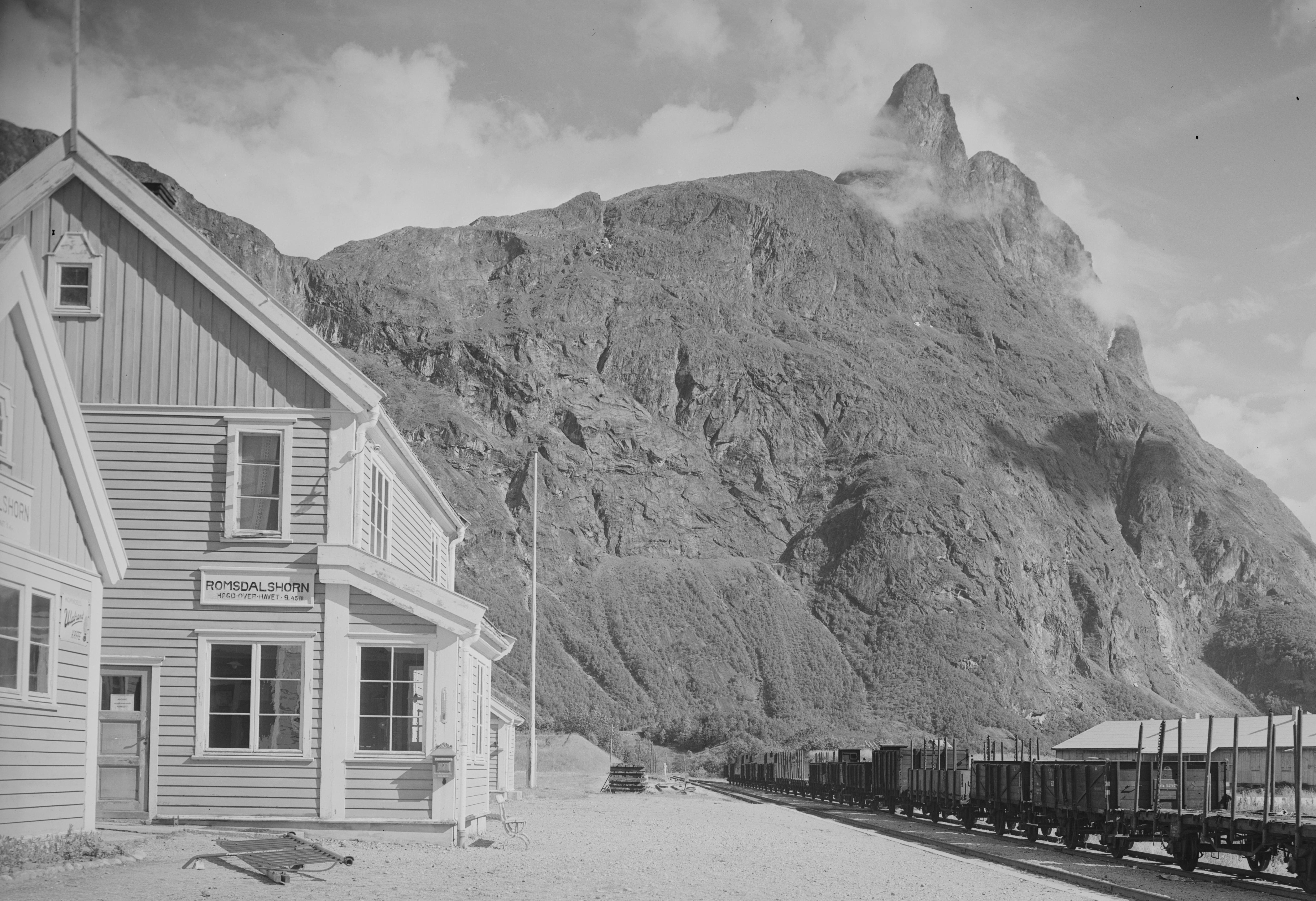 Bildet er hentet fra Nasjonalbibliotekets bildesamling. Anmerkninger til bildet var: Fotograf:Ukjent Romsdalen,Romsdalshornet, Rauma, Møre og Romsdal